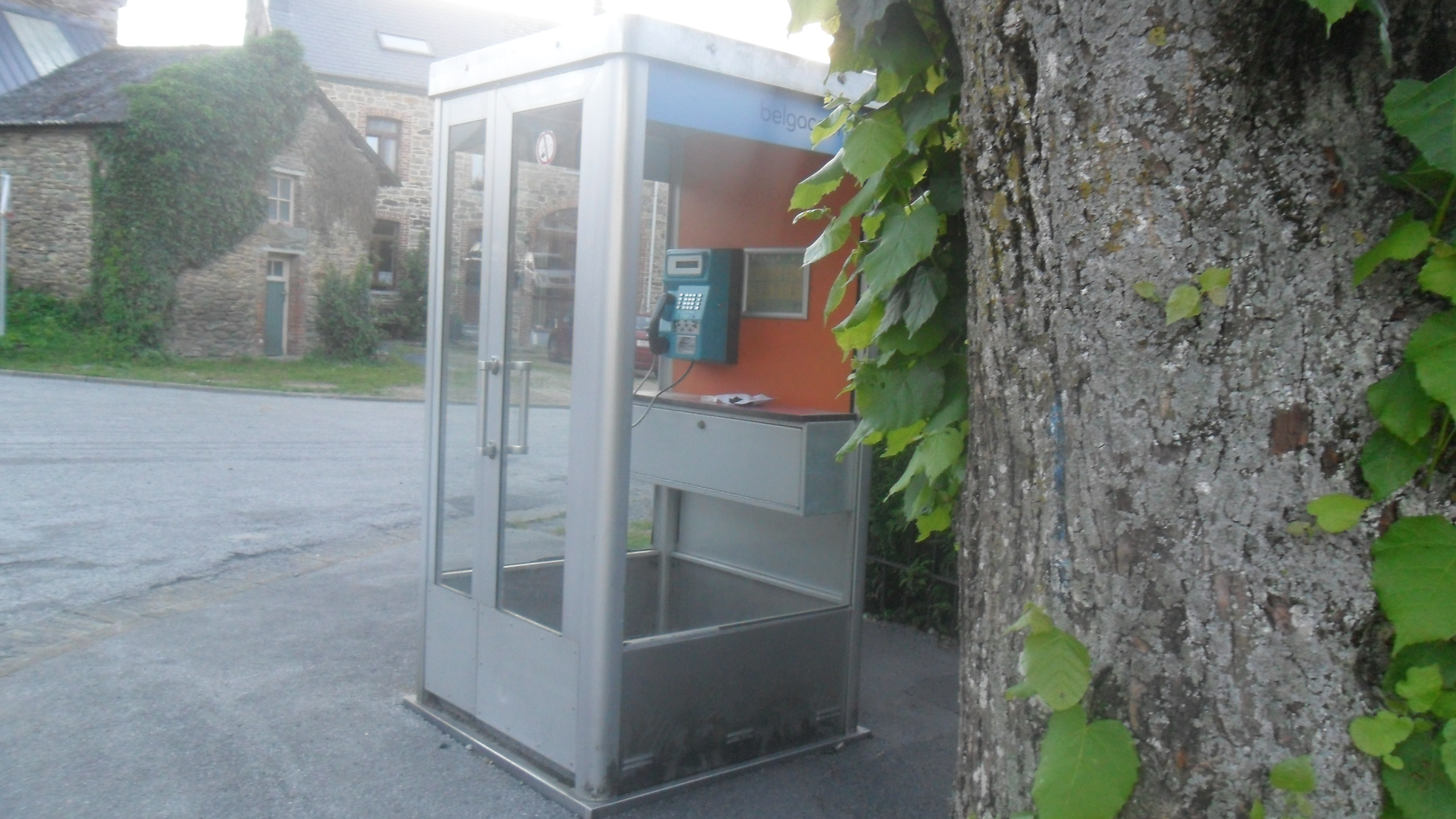 Een telefooncel in Porcheresse, Daverdisse